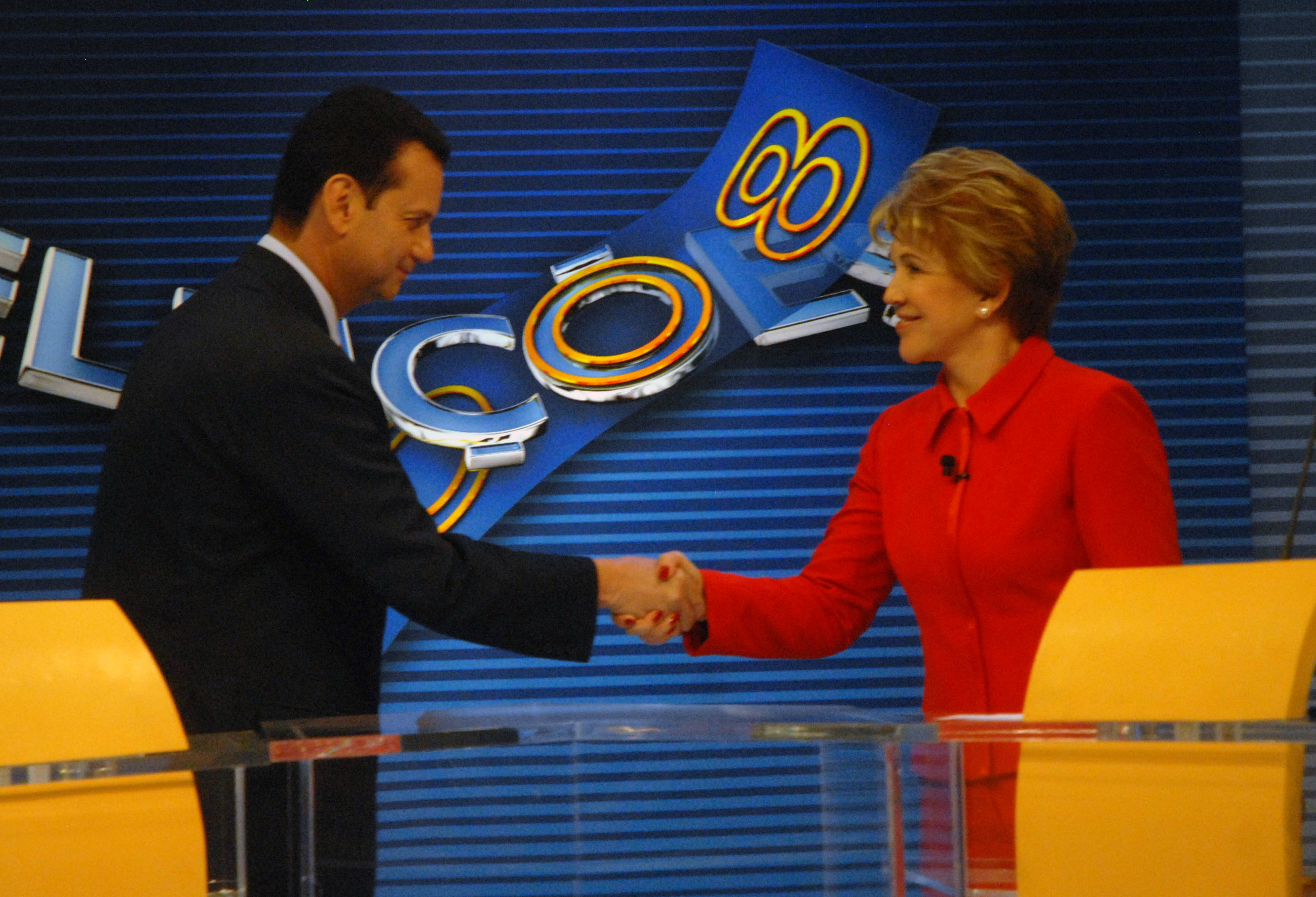 Os candidatos a prefeitura de São Paulo, marta suplicy e Gilberto Kassab no debate da Rede Globo